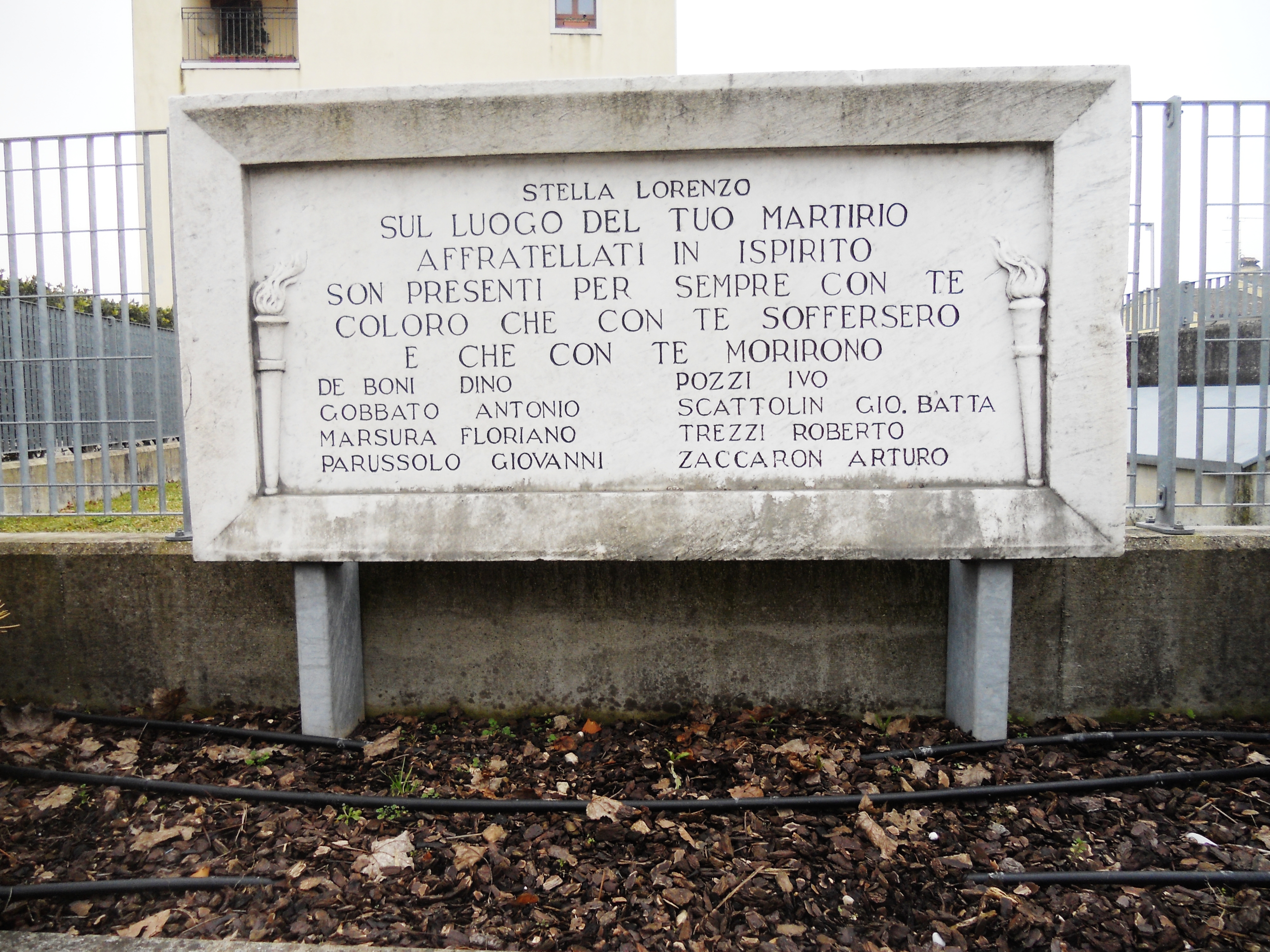 Targa in onore dei partigiani.